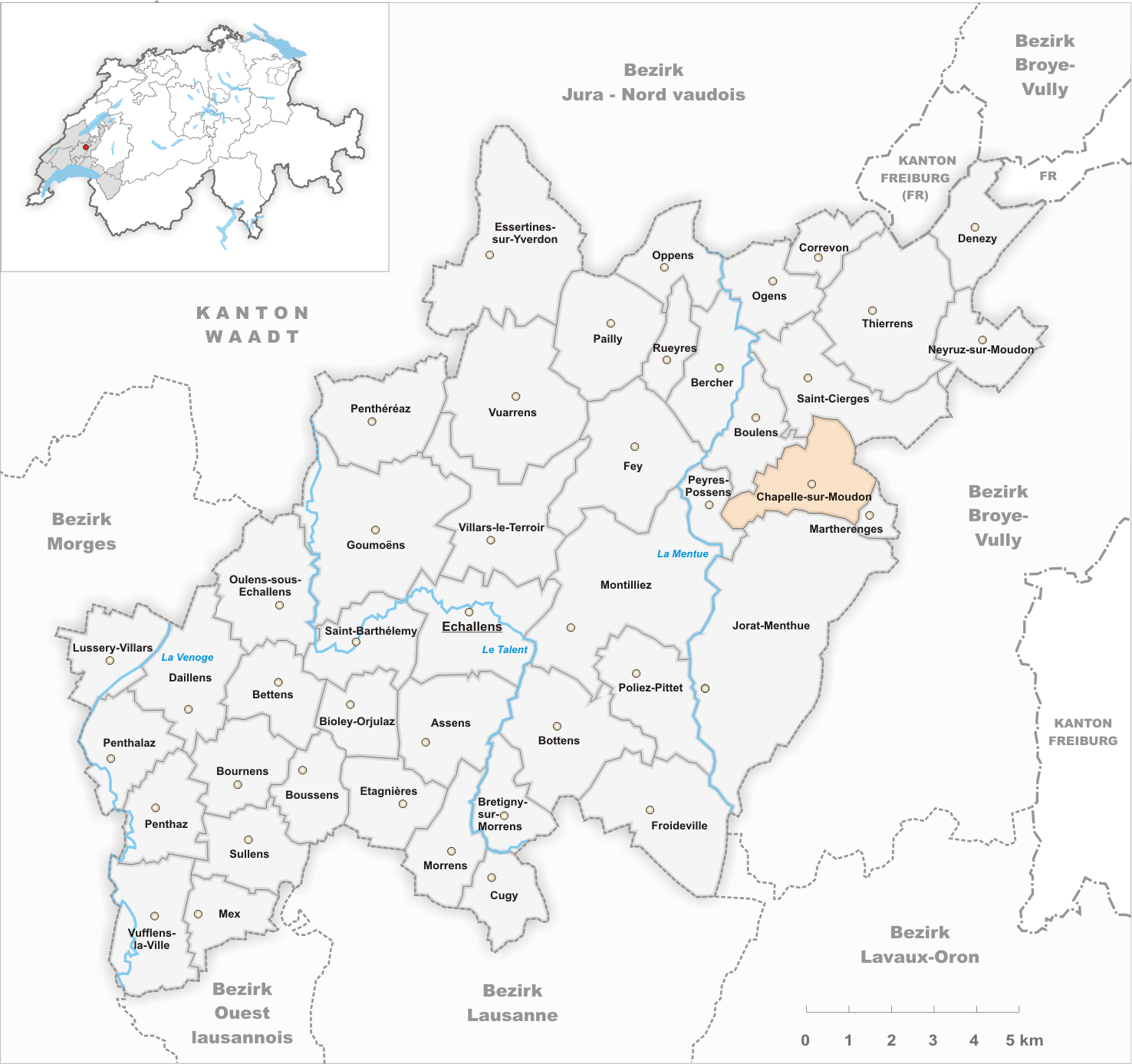 Municipality Chapelle-sur-Moudon